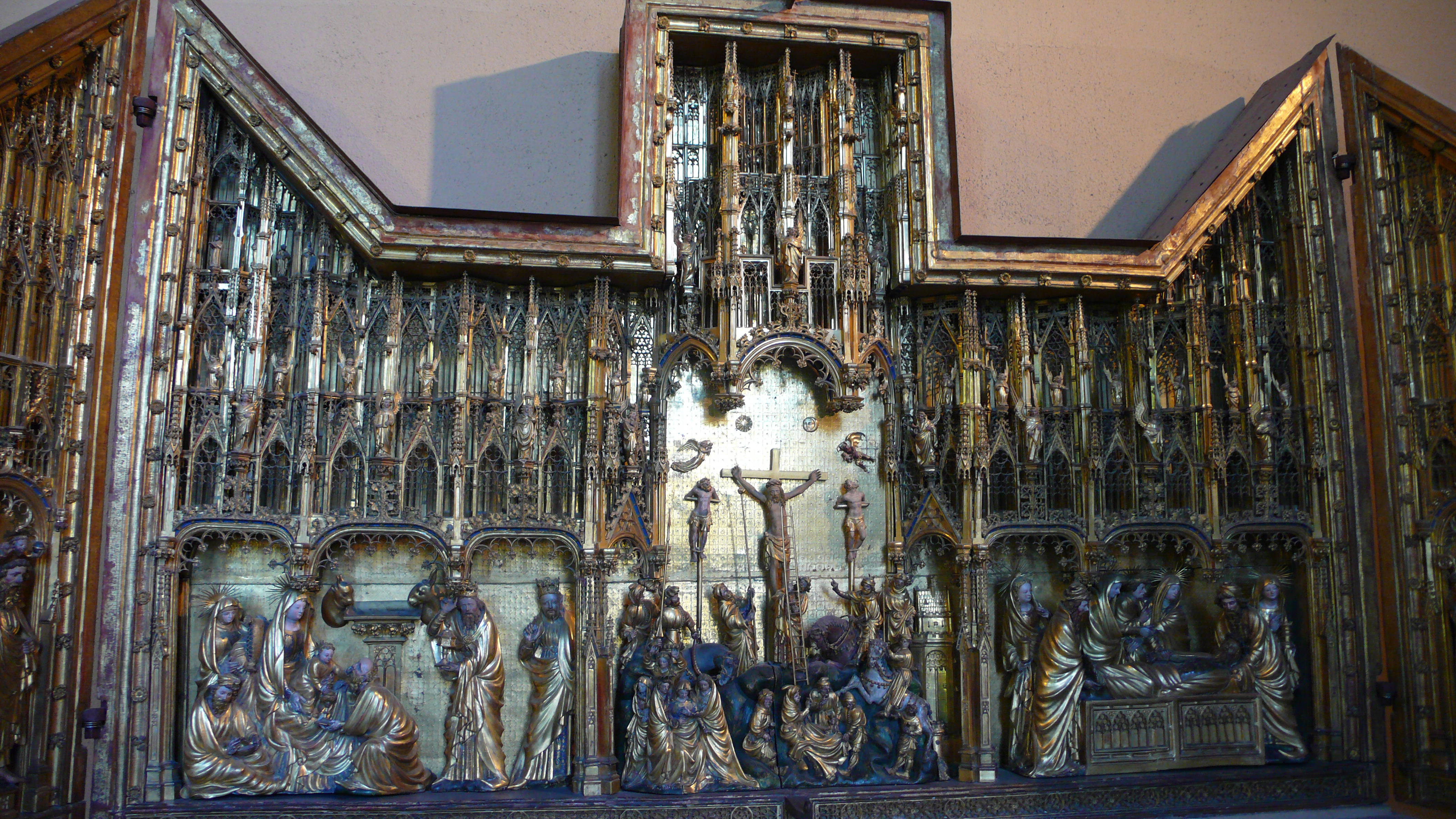 Retable de la crucifixion, (Musée des Beaux-Arts, Salle des Gardes), Palais des Ducs de Bourgogne à Dijon